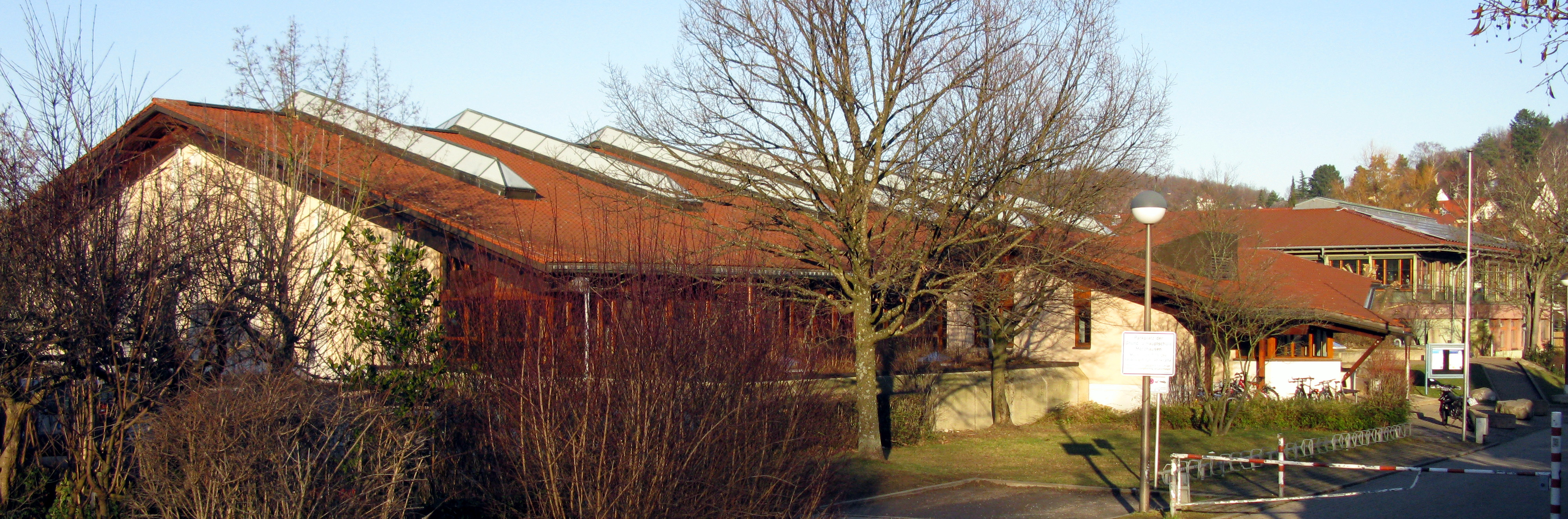 Sporthalle mit Hexentalschule im Hintergrund